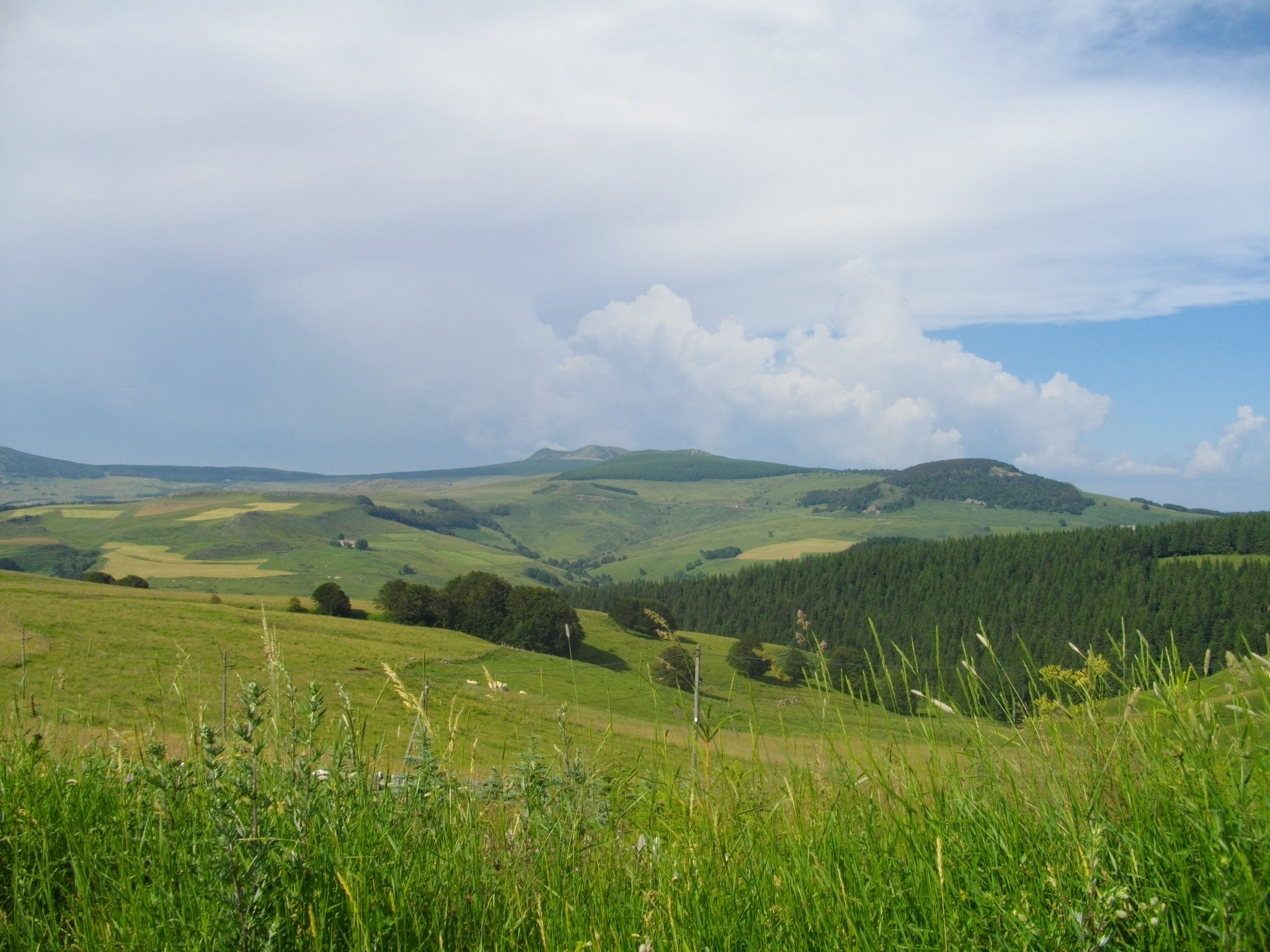 Vue sur le Mézenc depuis les hauts plateaux de Haute-Loire.